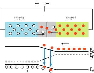 pn junction diode under forward bias